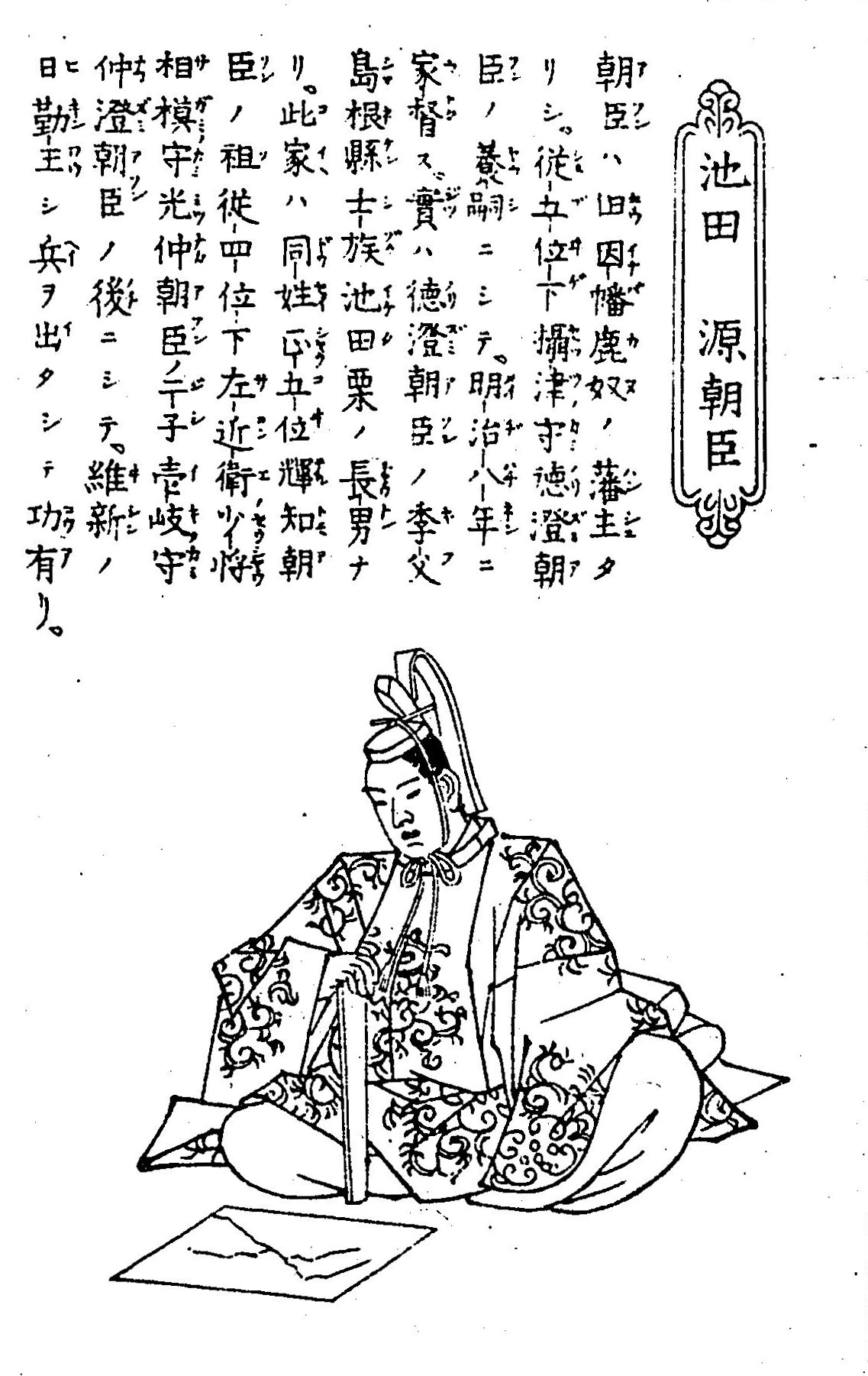 因幡鹿奴藩池田家11代当主・池田源の肖像画。